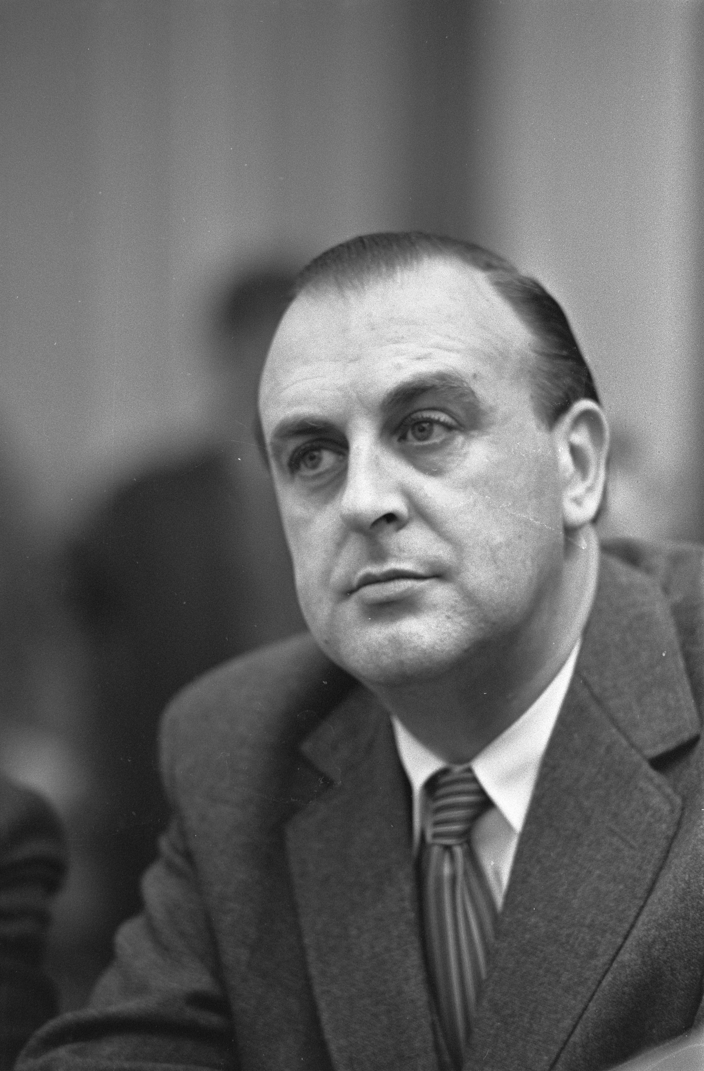 Collectie / Archief : Fotocollectie Anefo Reportage / Serie : [ onbekend ] Beschrijving : Kamerdebat over de vrijlating van de Drie van Breda; kamerlid Geurtsen (VVD) in de Tweede Kamer in Den Haag Datum : 29 februari 1972 Locatie : Den Haag, Zuid-Holland Trefwoorden : parlementaire debatten, parlementariërs, politiek, portretten Persoonsnaam : Geurtsen, Aart Fotograaf : Verhoeff, Bert / Anefo Auteursrechthebbende : Nationaal Archief Materiaalsoort : Negatief (zwart/wit) Nummer archiefinventaris : bekijk toegang 2.24.01.05 Bestanddeelnummer : 925-4229